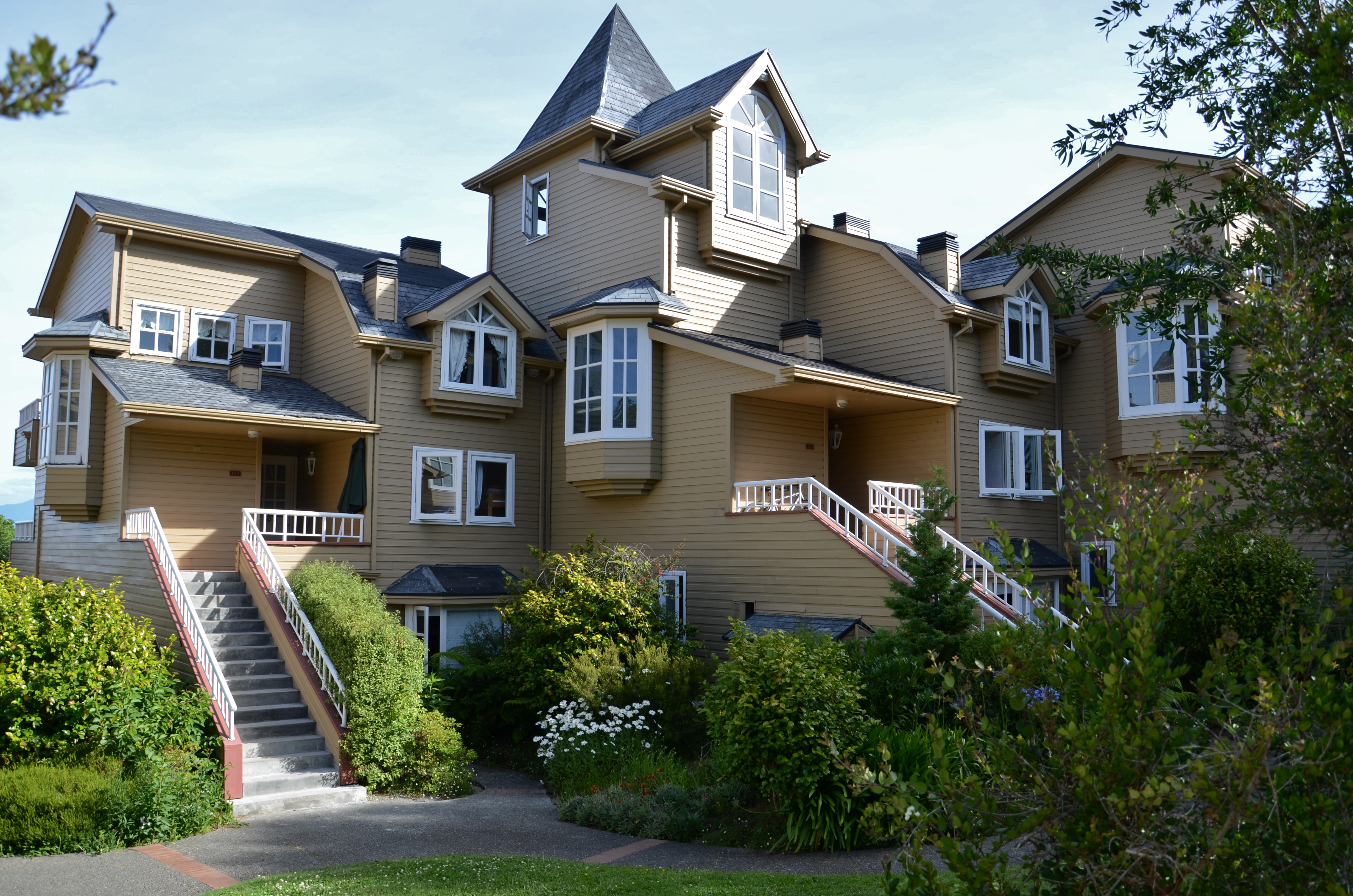 Casa solariega de arquitectura tradicional en la localidad de Coique, comuna de Futrono, Región de Los Ríos, Chile.